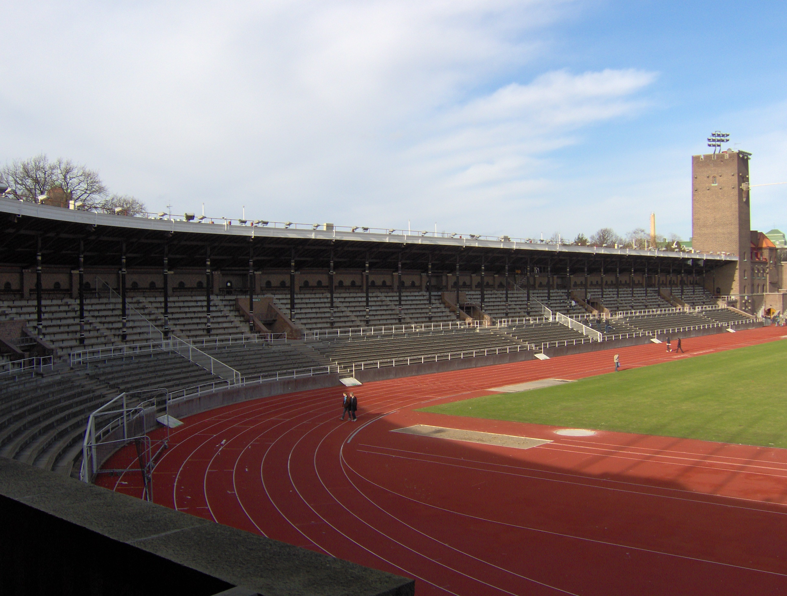 Supporter stand, Sofia Stå, at Stockholms Olympiastadion